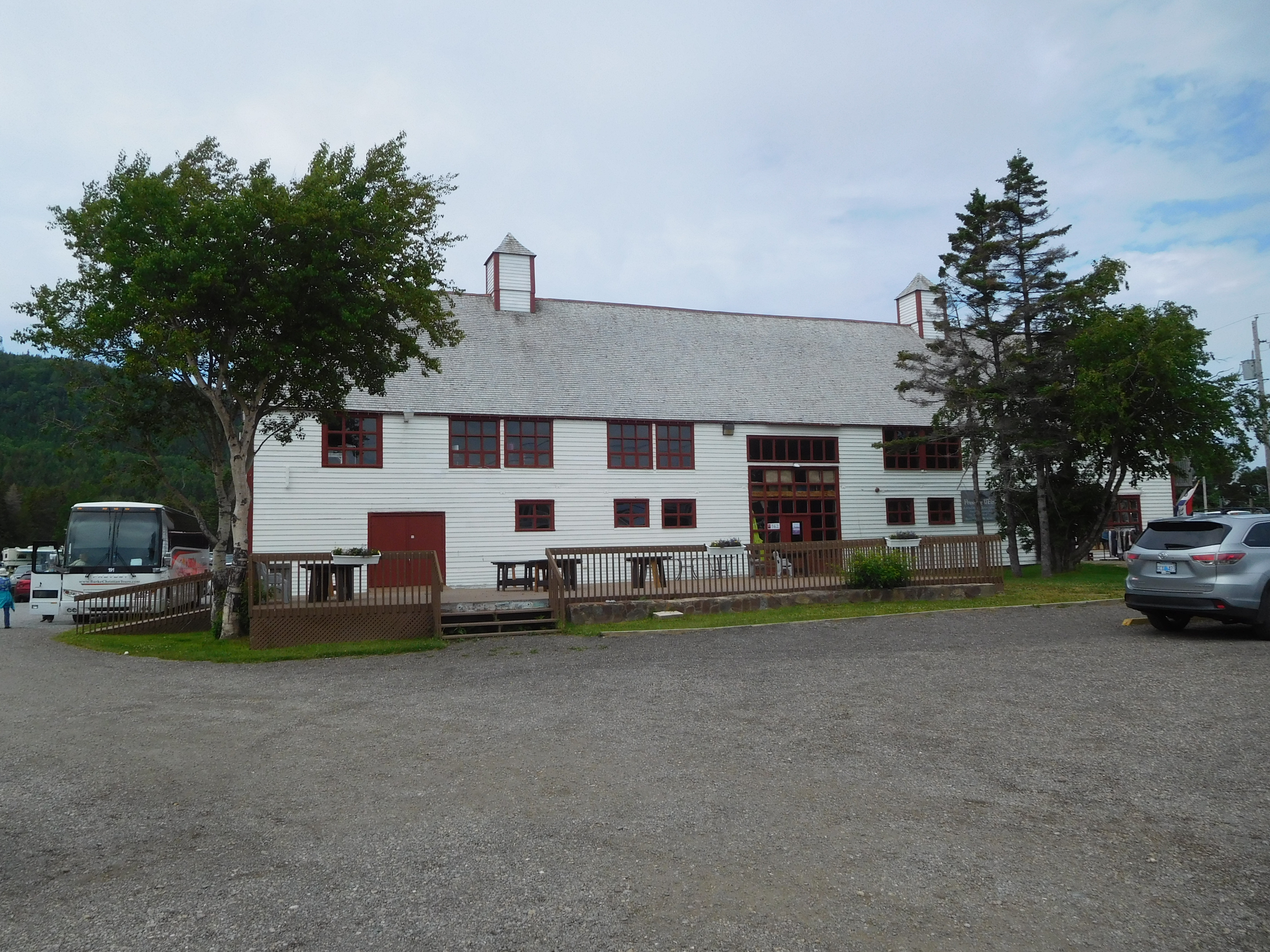 Grange Charles-Robin (Centre d'Art), 162, route 132 Ouest, Percé